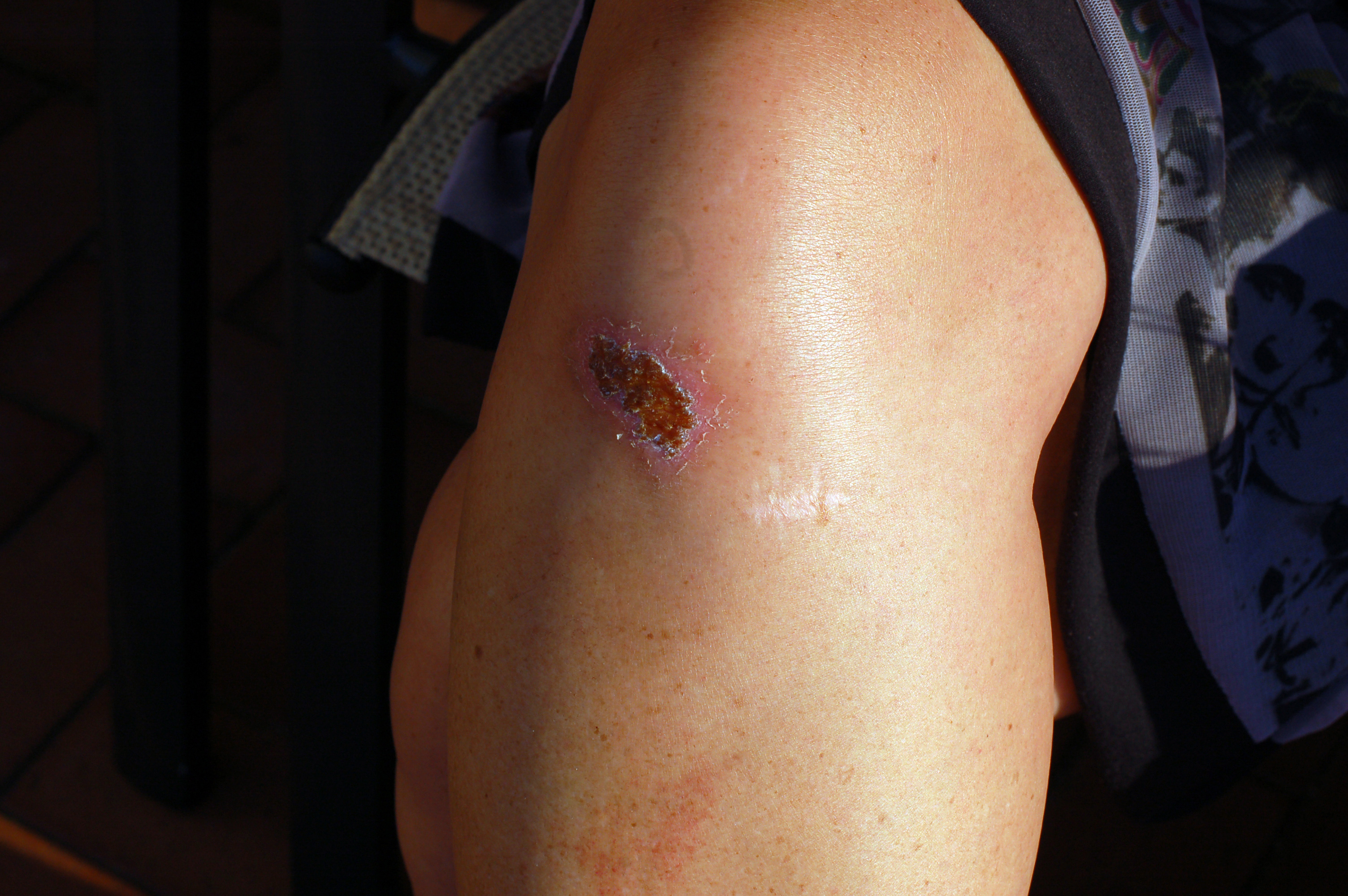 Wikimania Gdansk 2010